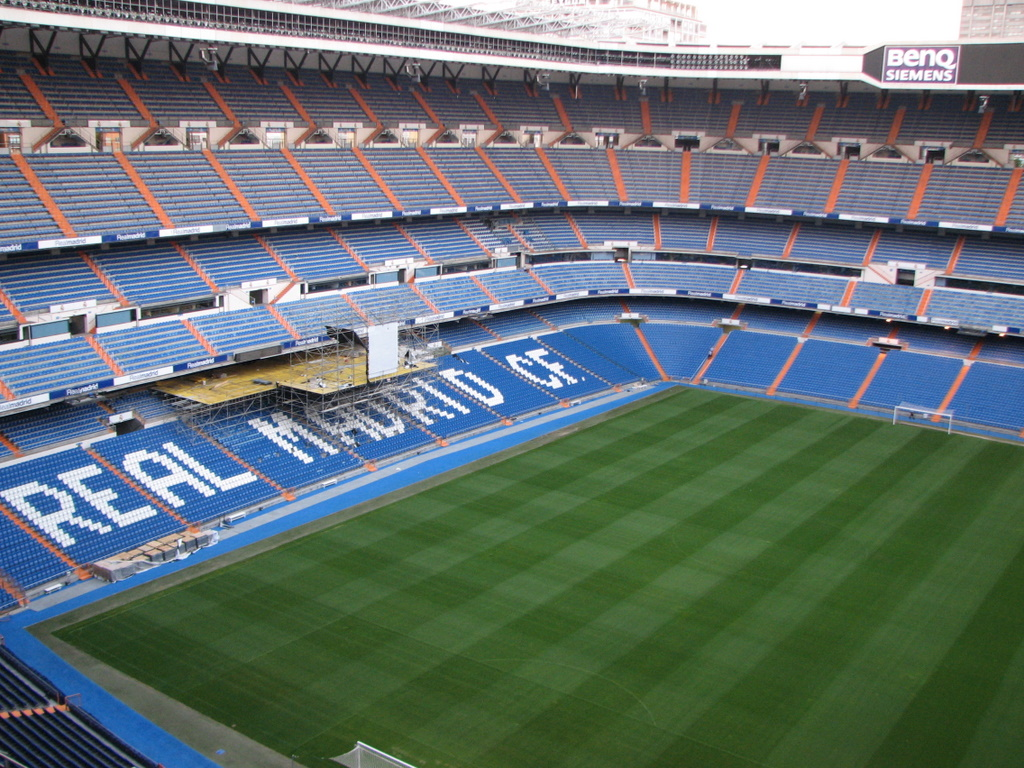 Santiago Bernabéu Staduim